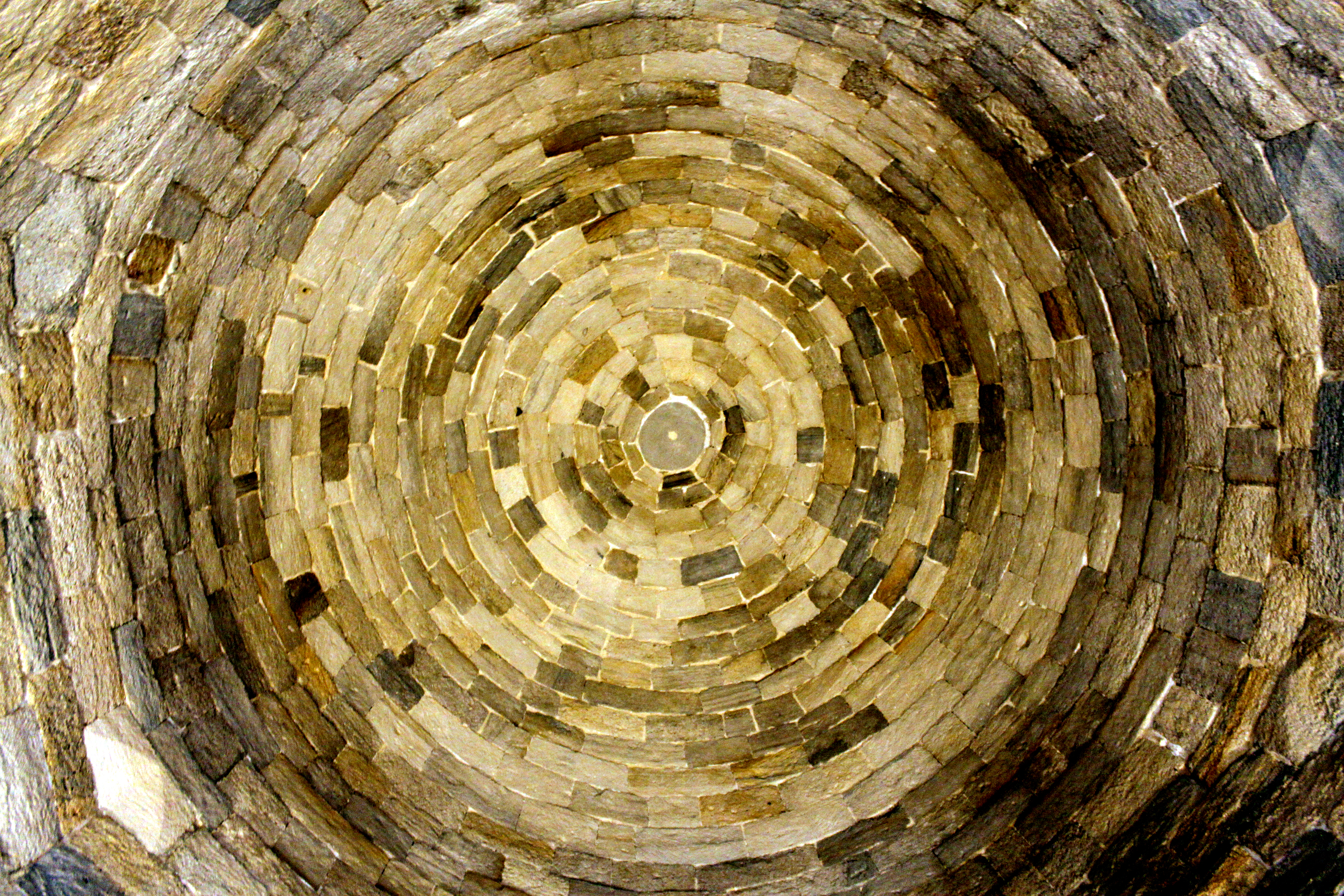 Seyid Yəhya Bakuvi türbəsinin qübbəsi